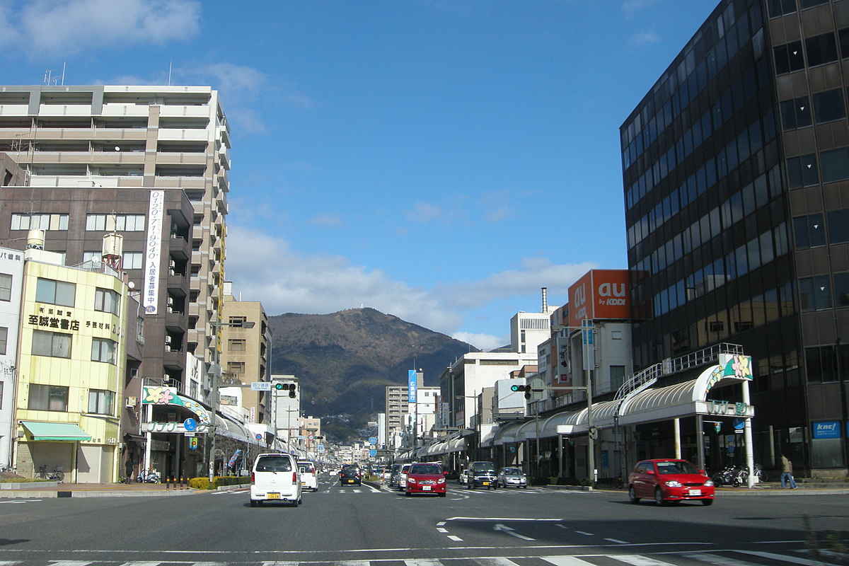 呉市本通 Hondori